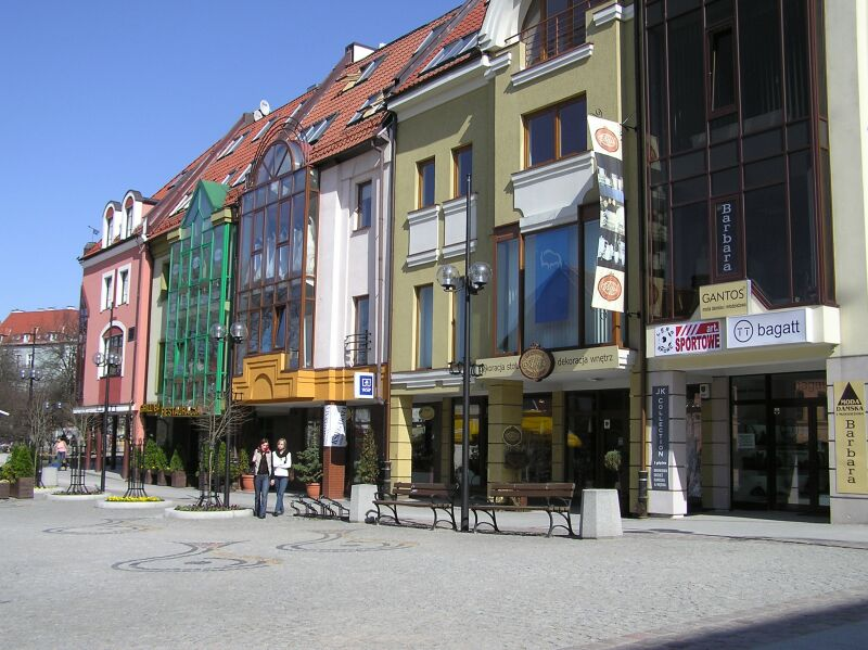 Olsztyn - Stare Miasto - Targ Rybny